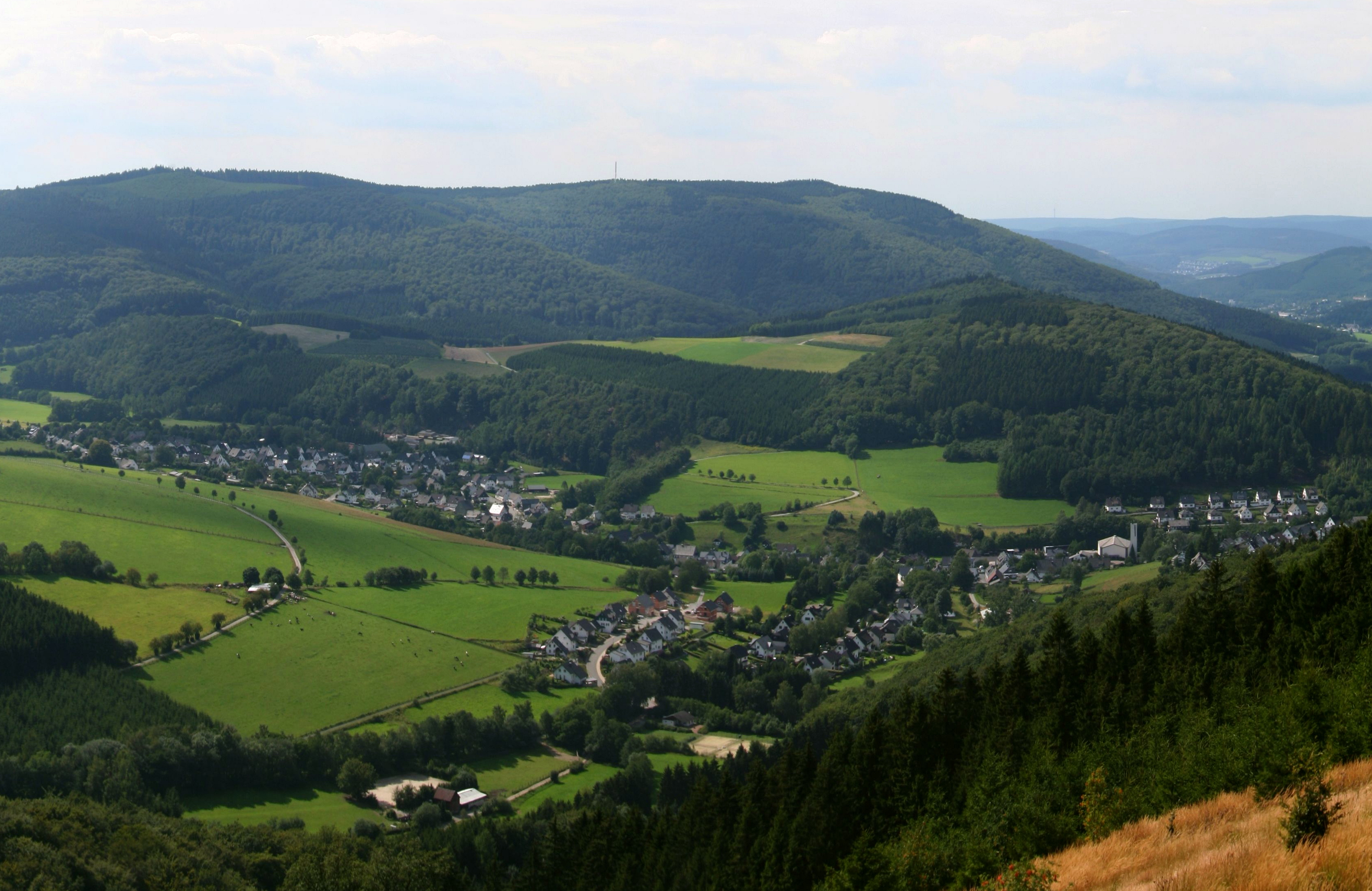 Blick von der Nordkuppe des Ginsterkopfes auf Olsberg-Elleringhausen, dahinter Heidkopf (715 m), Olsberg (703 m) und Ruthenberg (543 m)